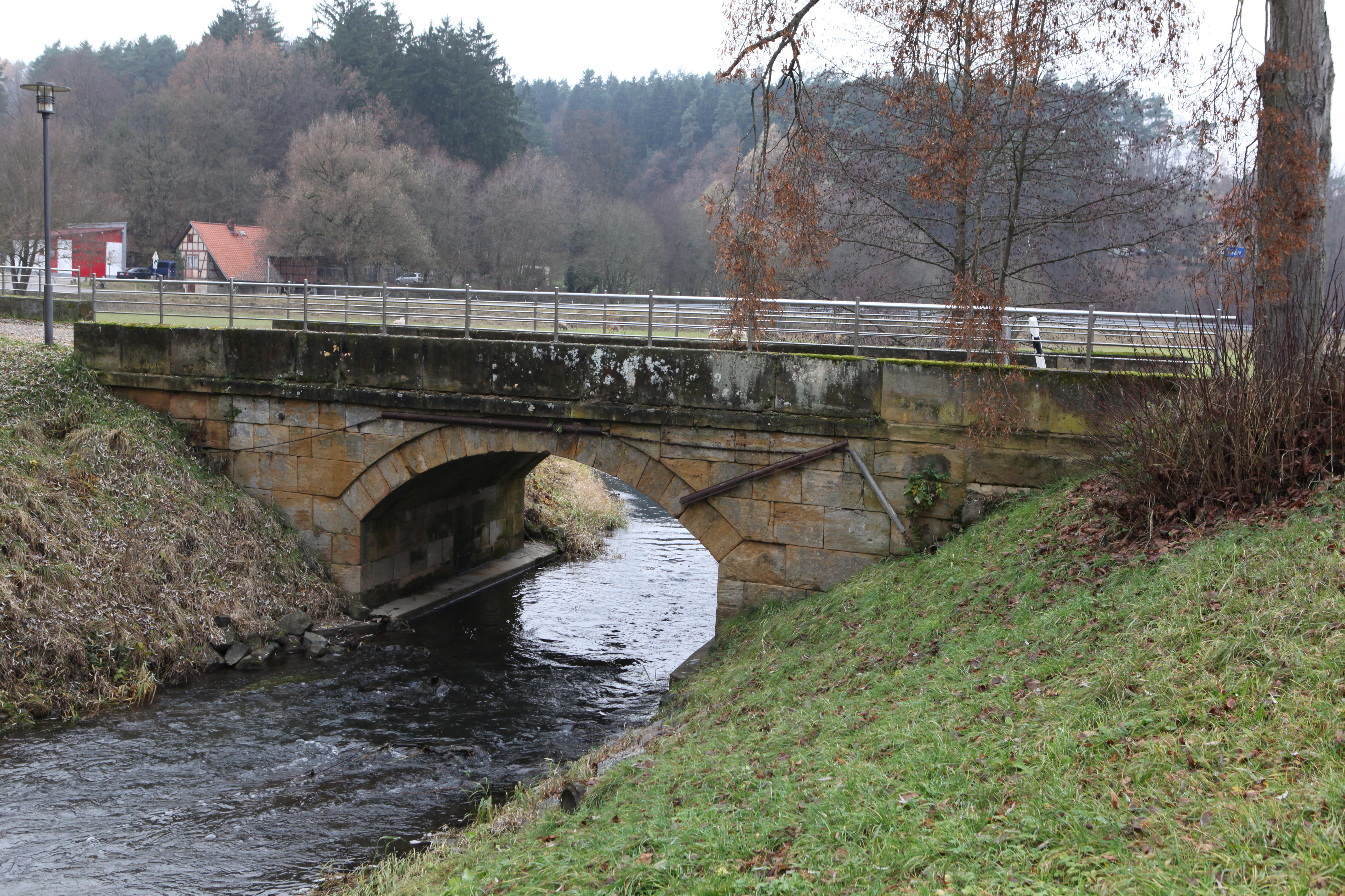 Rodachbrücke (wohl 1910) an der historischen Kuranlage in Bad Colberg, Lkr. Hildburghausen